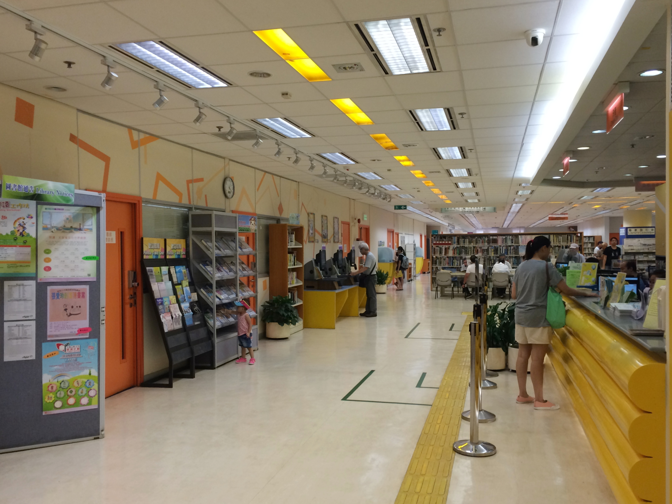 Aberdeen Public Library